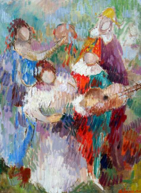 Musiker, George Stefanescu, Öl/Leinwand, 1965, Privat Sammlung Dipl.Ing.Arch. Radu Stefanescu-Gross, Lüdinghausen, Deutschland.